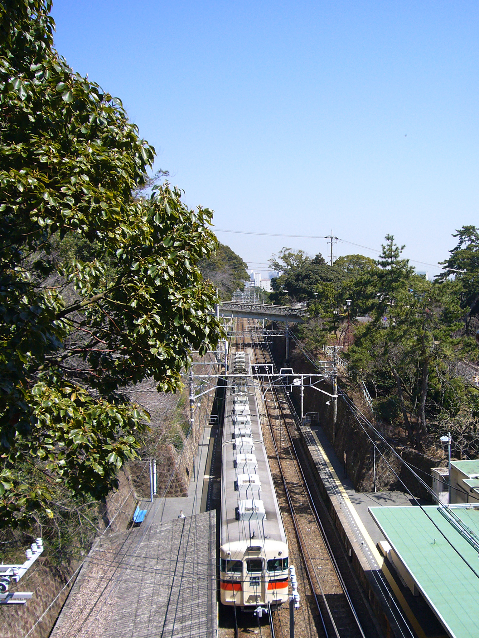 Sumaura-Koen Station in Kobe, Japan